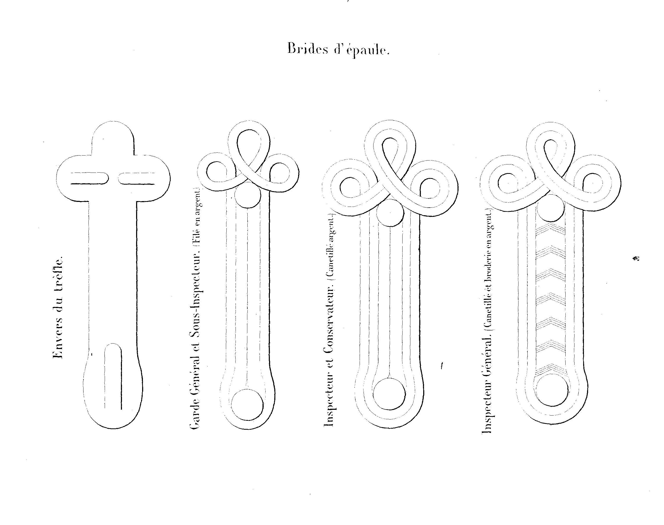 Brides d'épaules d'agents forestiers - officiers de chasseurs forestiers tells que définies en 1878.